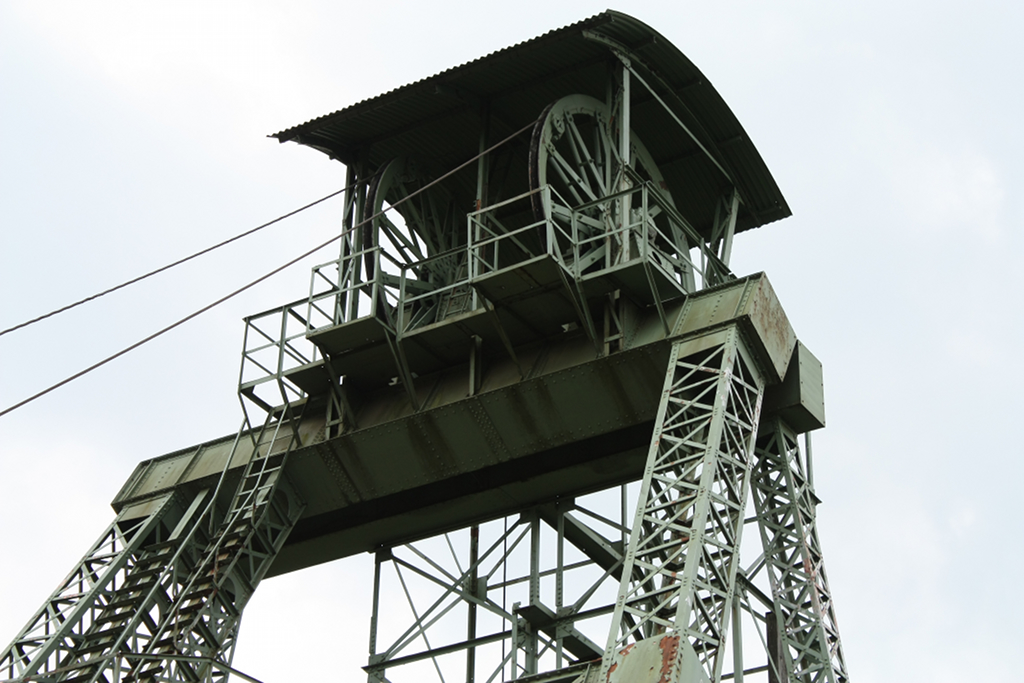 Fördergerüst des Ottilae-Schachts bei Clausthal-Zellerfeld im Oberharz von 1876